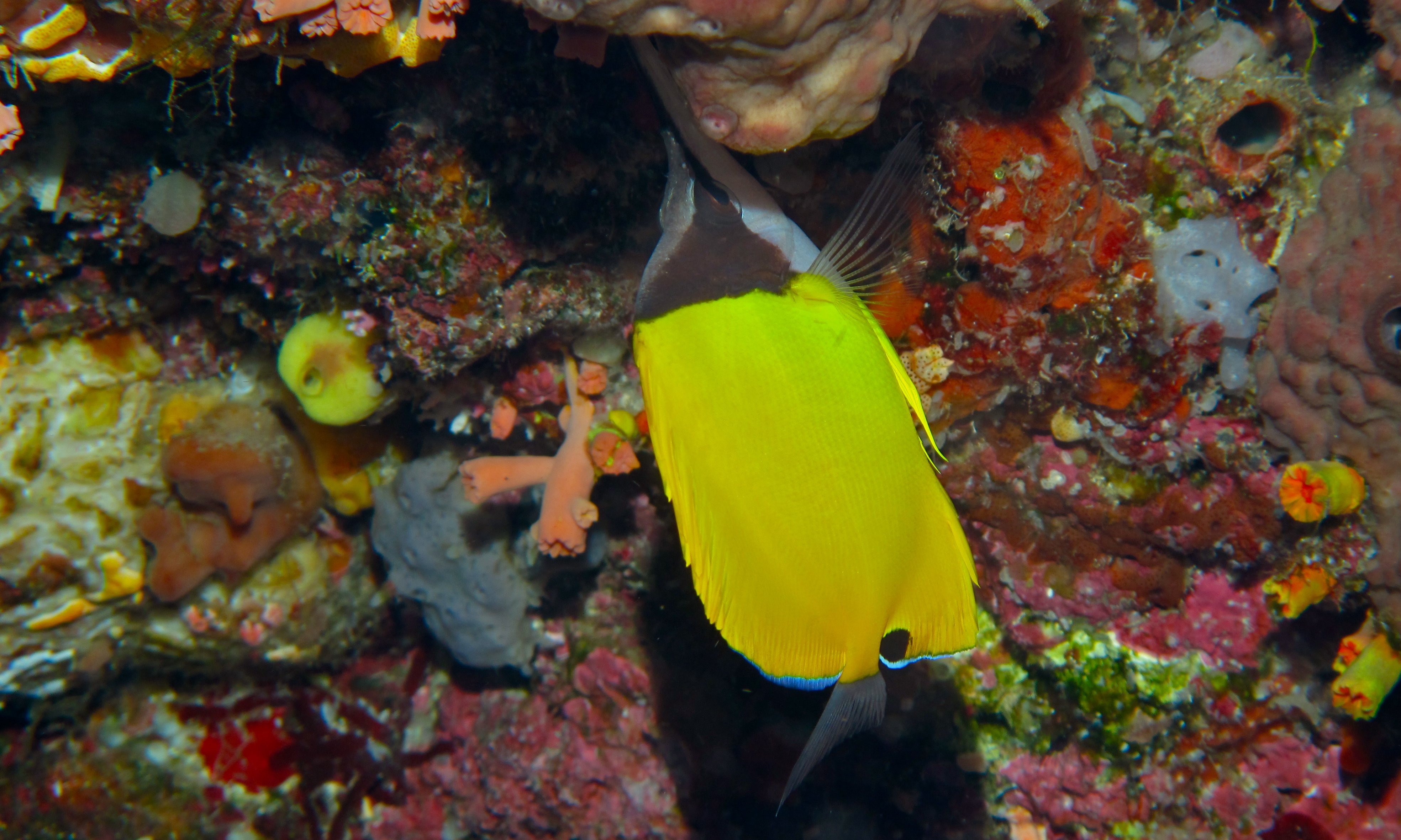 Tanjung, Bunaken Island, Sulawesi, INDONESIA